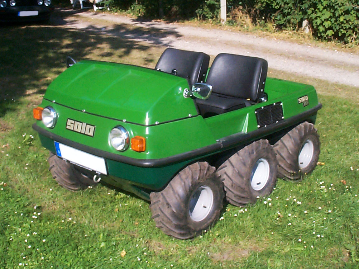 Solo 750 Standbild